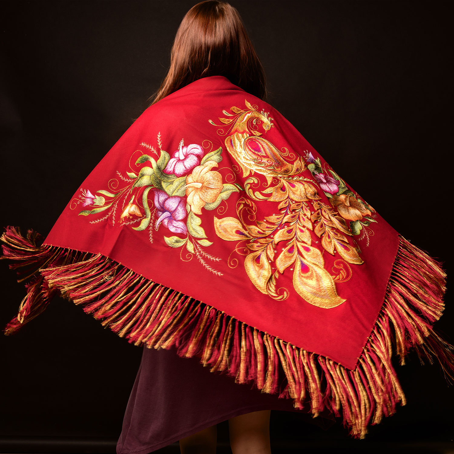 Платок с золотой вышивкой | Торжокские золотошвеи